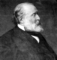 Patriota e politico italiano, esponente del Risorgimento italiano, senatore e ministro del Regno d'Italia